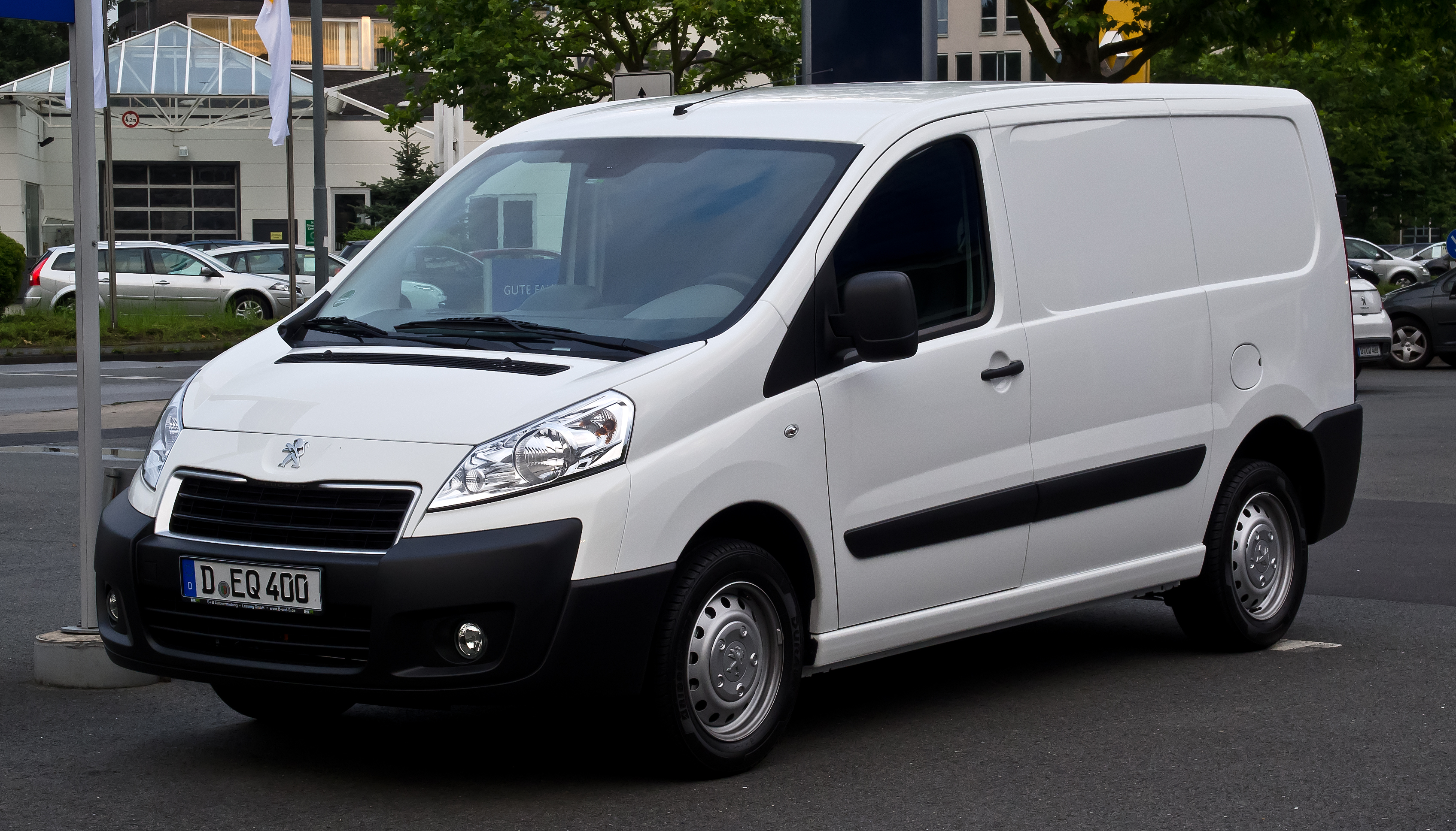 Peugeot Expert (II, Facelift)